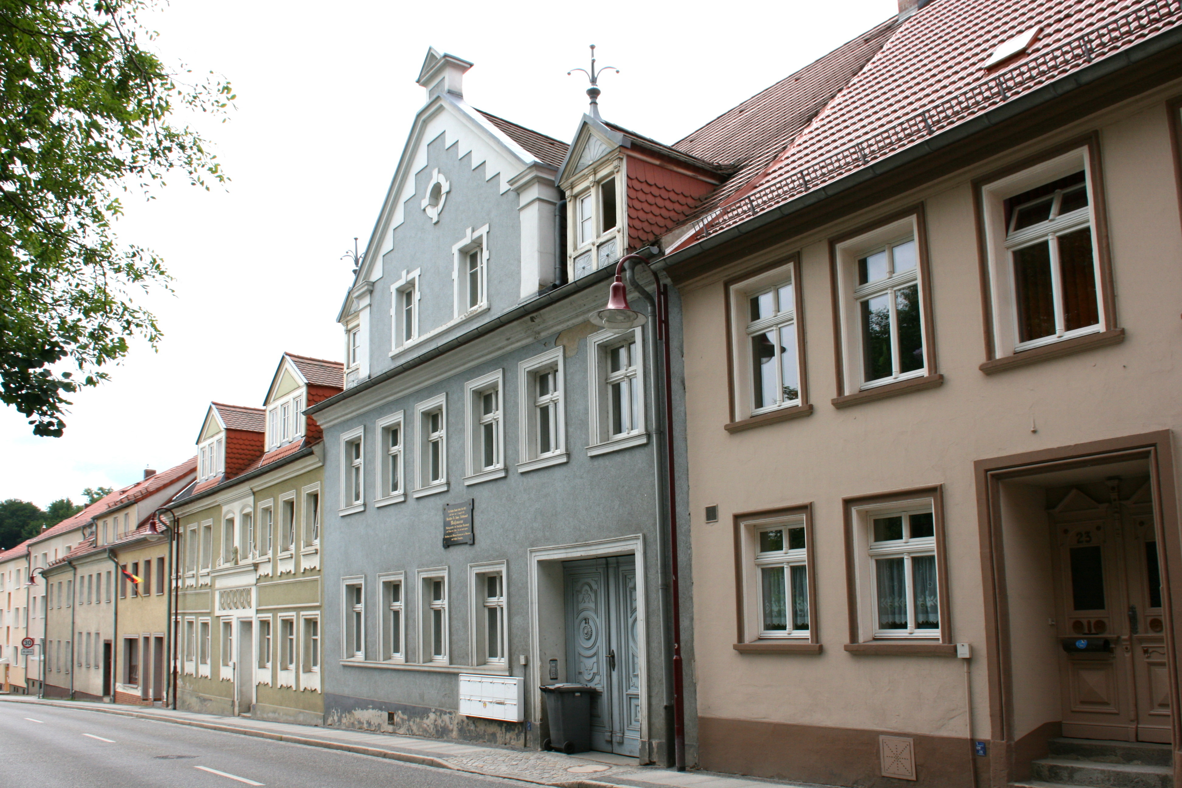 Berliner Straße in Bad Muskau. Denkmalgeschützte Wohnhäuser Berliner Straße 23 (rechts), Berliner Straße 21 (sogenanntes Maßmann-Haus mit Erinnerungstafel an H. F. Maßmann) und Berliner Straße 19.